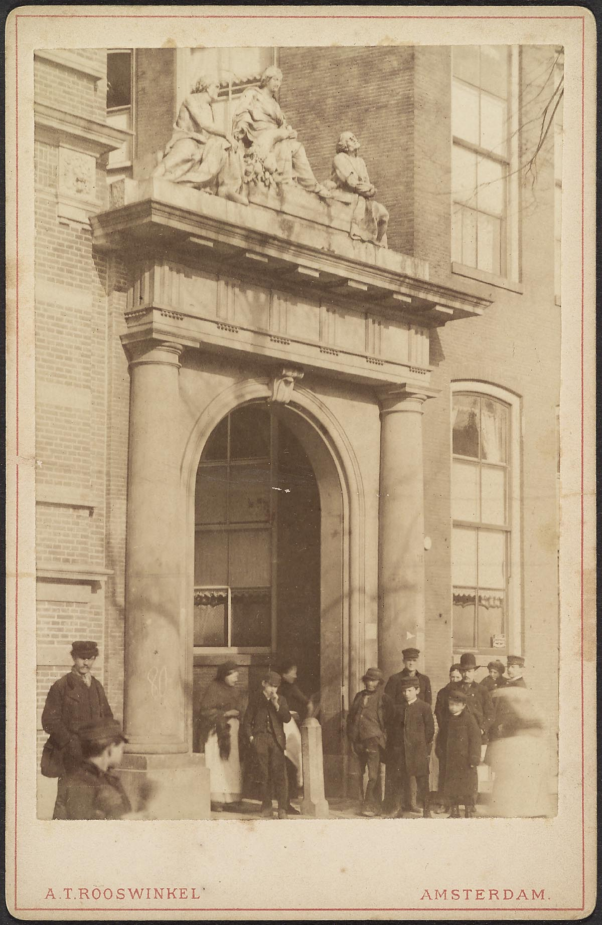 Oudemanhuispoort Amsterdam, Netherlands